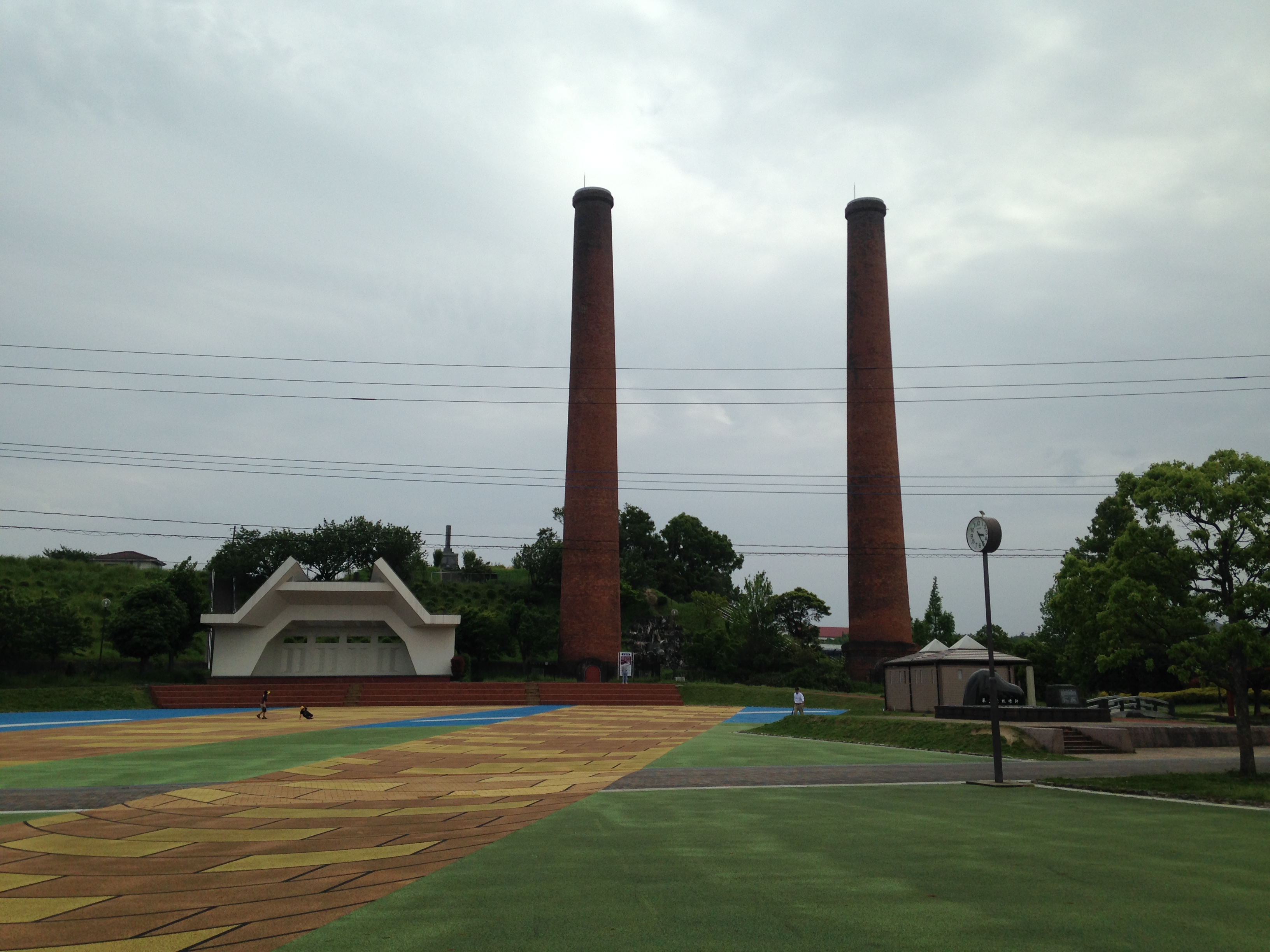 石炭記念公園内の旧三井田川鉱業所伊田坑第1・第2煙突